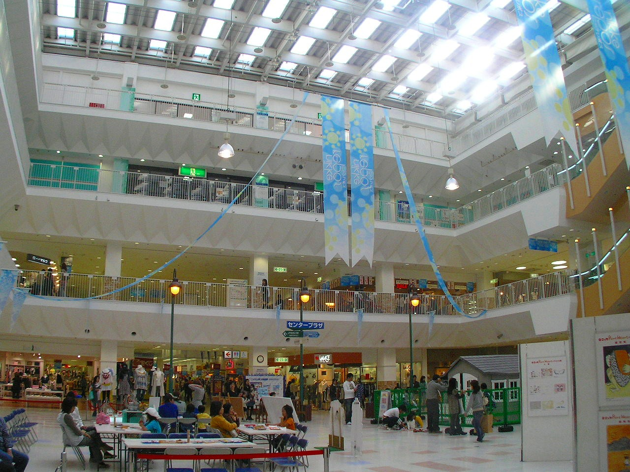 ニッケパークタウン（NIKKE PARKTOWN）は、兵庫県加古川市にある複合型ショッピングセンターである。 運営は日本毛織株式会社。